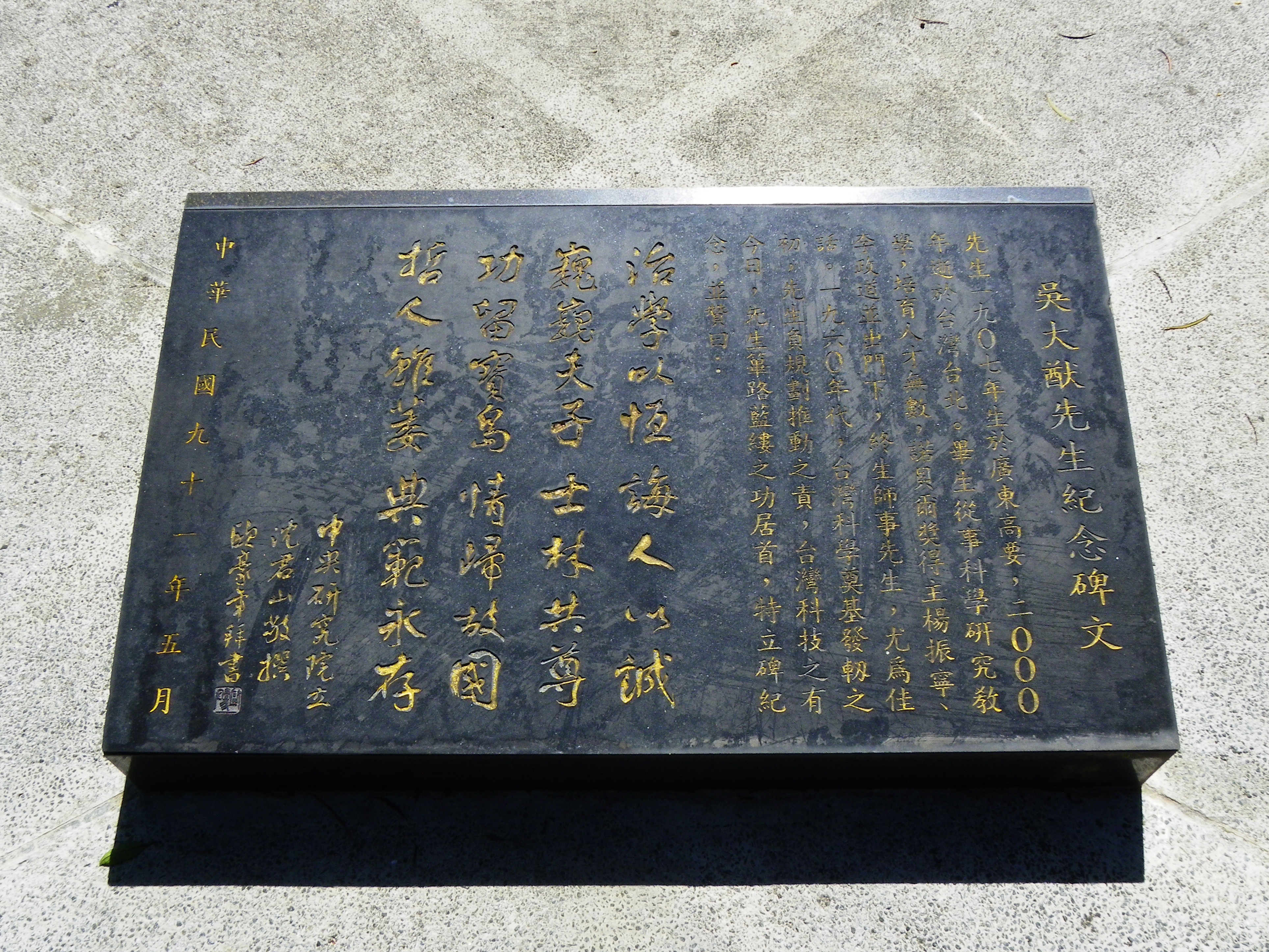 吳大猷先生紀念碑文，2002年5月中央研究院立、沈君山撰、歐豪年書。